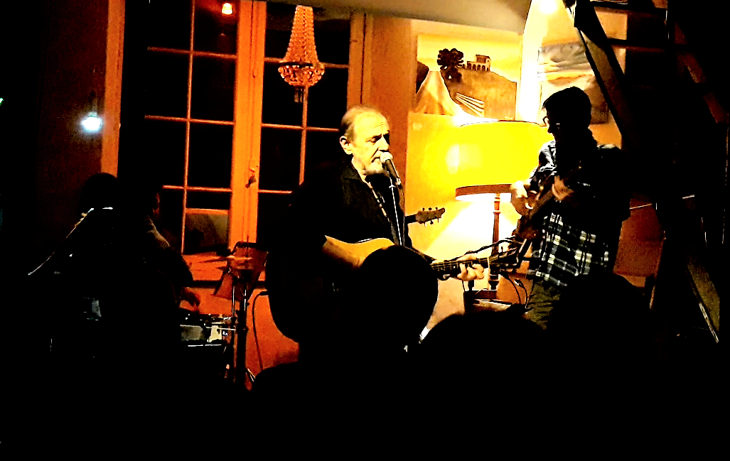 Enrico Lisei in concerto Genova dicembre 2017 Spazio Lomellini